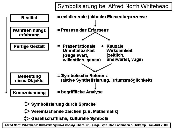 Schematische Übersicht über die Theorie der Symbolisierung von Alfred North Whitehead in Kulturelle Symbolisierung